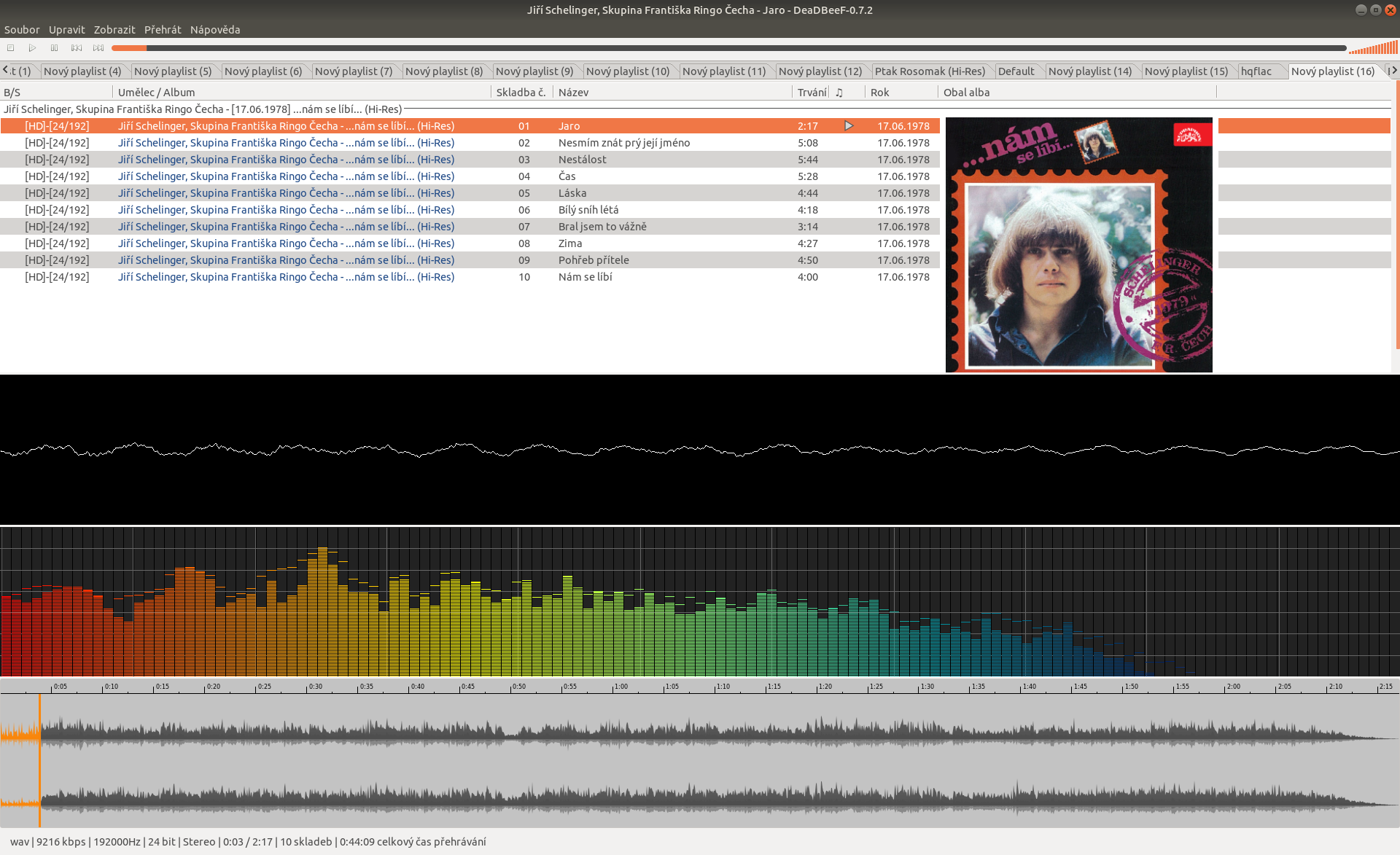 Aktuální verze přehrávače pro audiofily DeaDBeeF